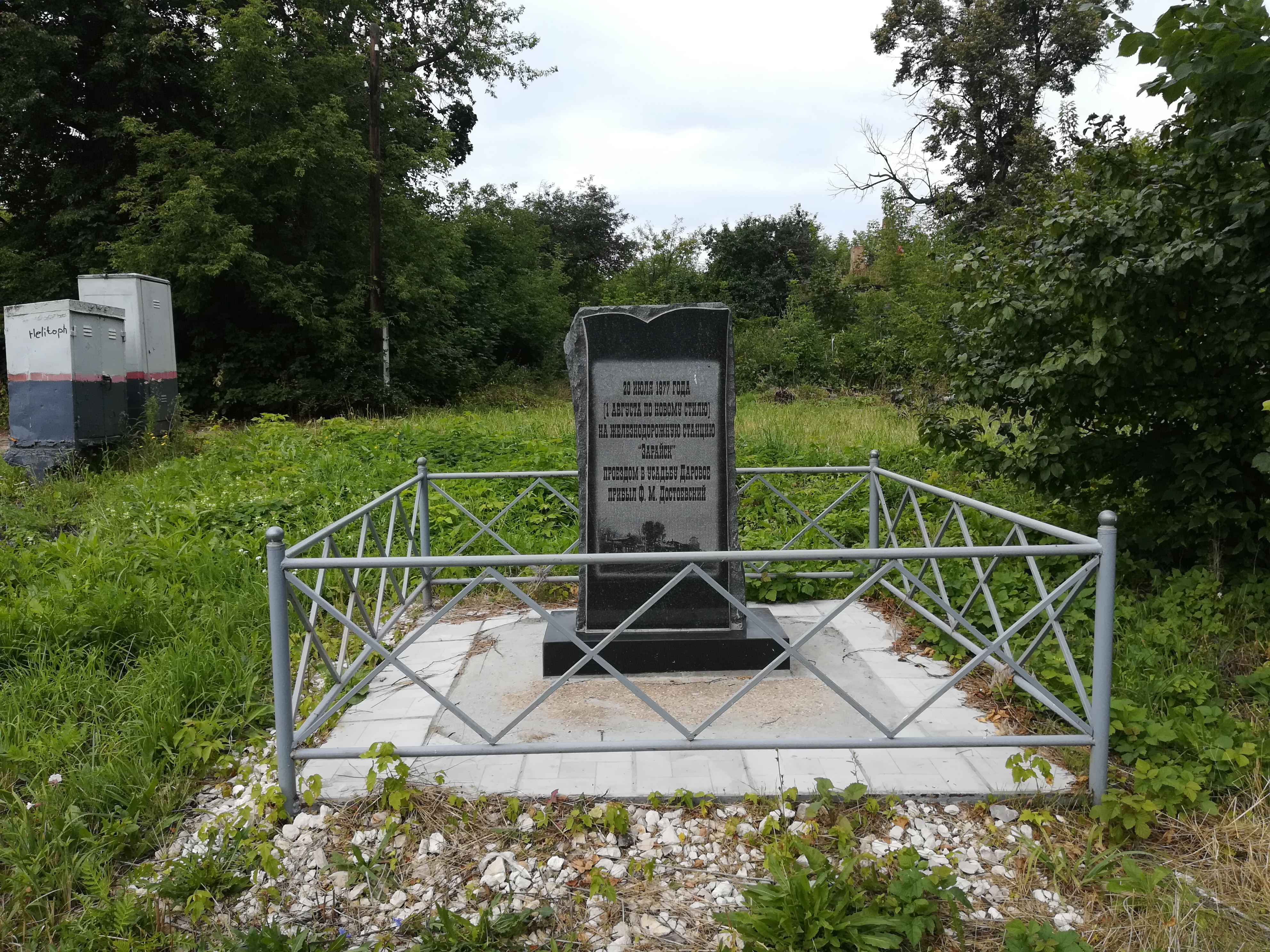 Зарайск